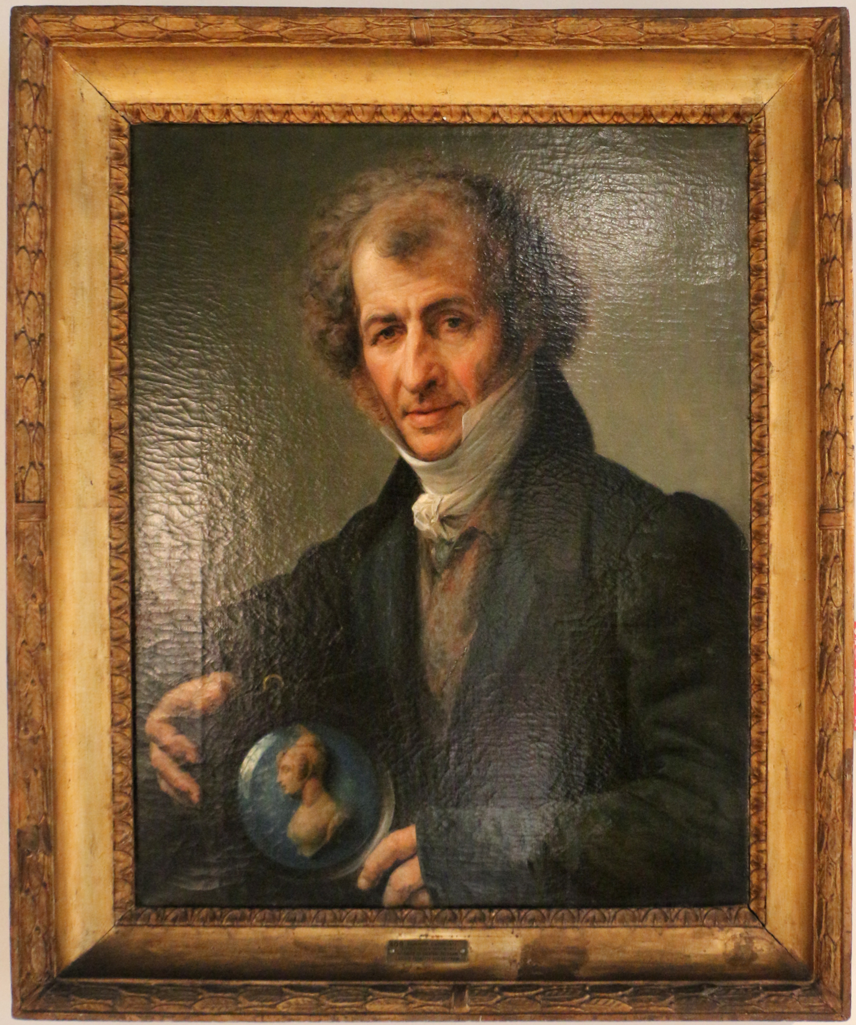 missing